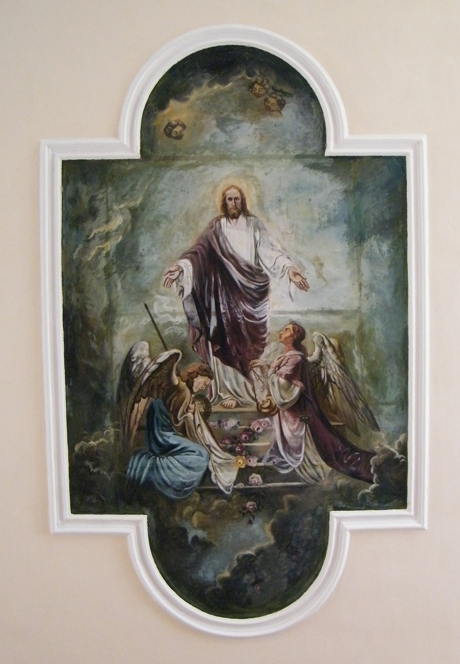 Kostel svatého Bartoloměje ve Velkém Šenově, freska